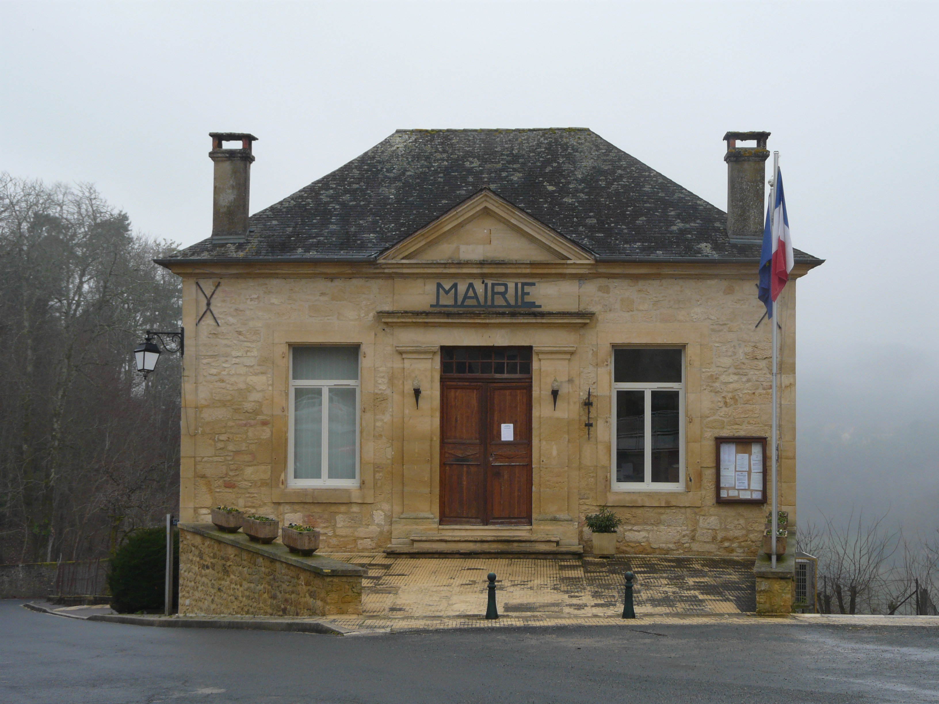 La mairie de Carlux, Dordogne, France.